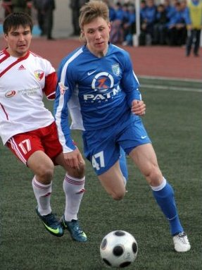 Беляев Роман